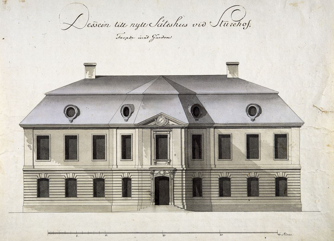 Fasadritning mot öster för Sturehovs slott